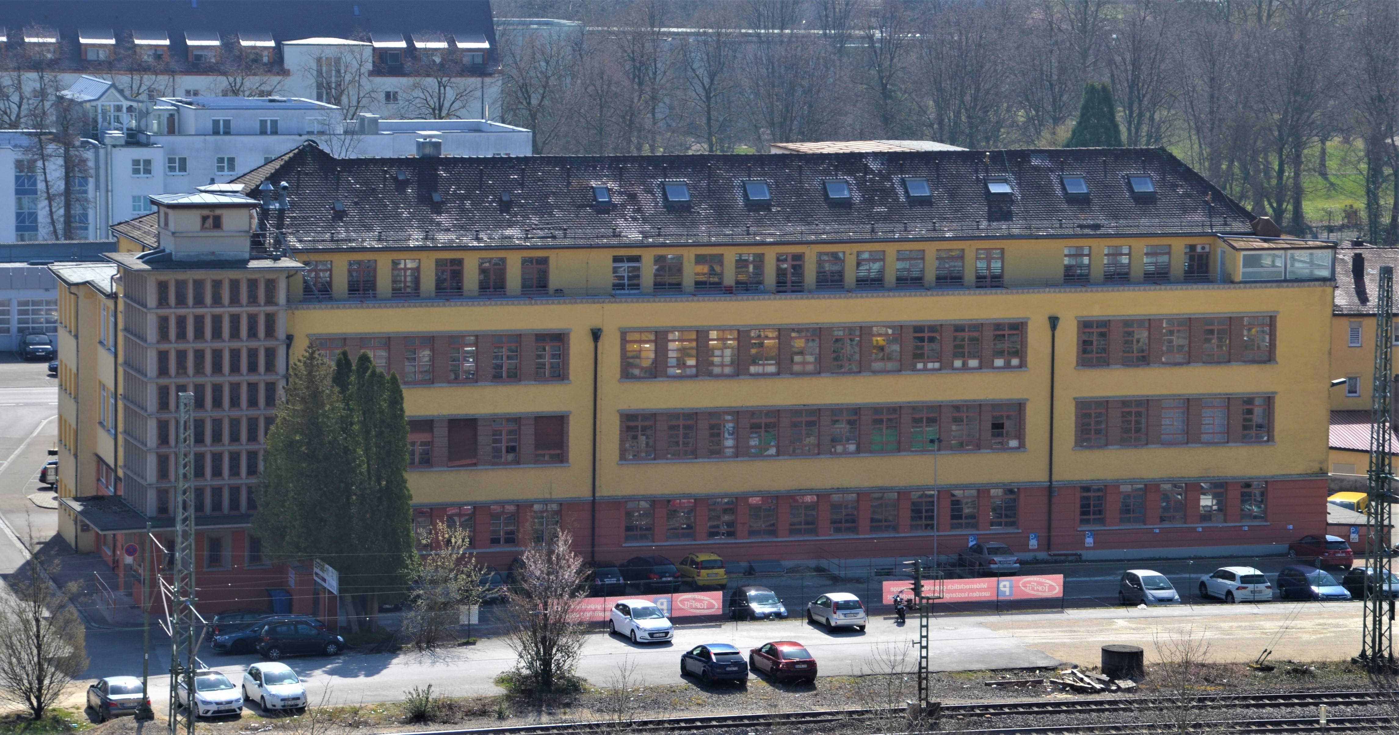 Bifora-Werk in Schwäbisch Gmünd, in der Nähe des Gmünder Bahnhofs, vom Salvator aufgenommen